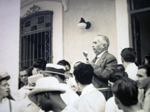 Don Pedro M. Fabregat en un discurso político en el Ayuntamiento de Ranchuelo